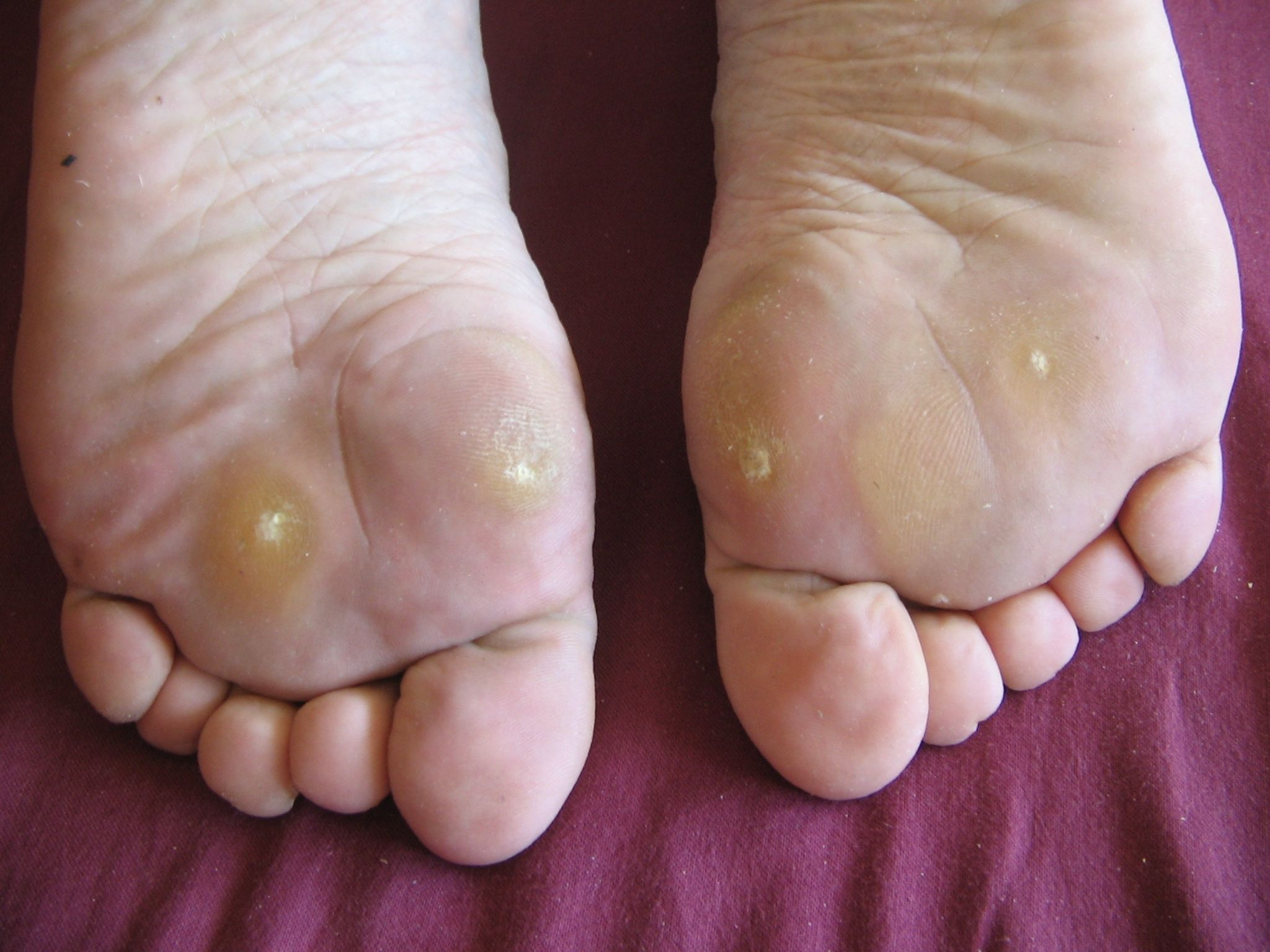 Dornwarzen an beiden Sohlen, alle von großer Schmerzhaftigkeit. Die Warzen unter dem linken Fuß existieren bereits seit über 35 Jahren, wurden von der 57-jährigen Patientin für Hühneraugen gehalten und entsprechend behandelt. Nach der korrekten Diagnose vor wenigen Jahren entstanden auch an der rechten Fußsohle zwei Dornwarzen. Die beiden mittig gelegenen Warzen rechts und links (unter dem 4. bzw. 3. Metatarsalköpfchen) besitzen in der Tiefe einen tastbaren Durchmesser von der Größe eines 2-Euro-Stücks und schmerzen mitunter auch aus der Ruhe heraus. Eine Stickstoffbehandlung wurde versucht, wurde aber nach einigen Sitzungen wegen Ergebnislosigkeit abgebrochen. Seit dem zusätzlichen Warzenbefall der rechten Fußsohle ist die Patientin erheblich gehbehindert und muß ihre Aktivitäten stark einschränken.